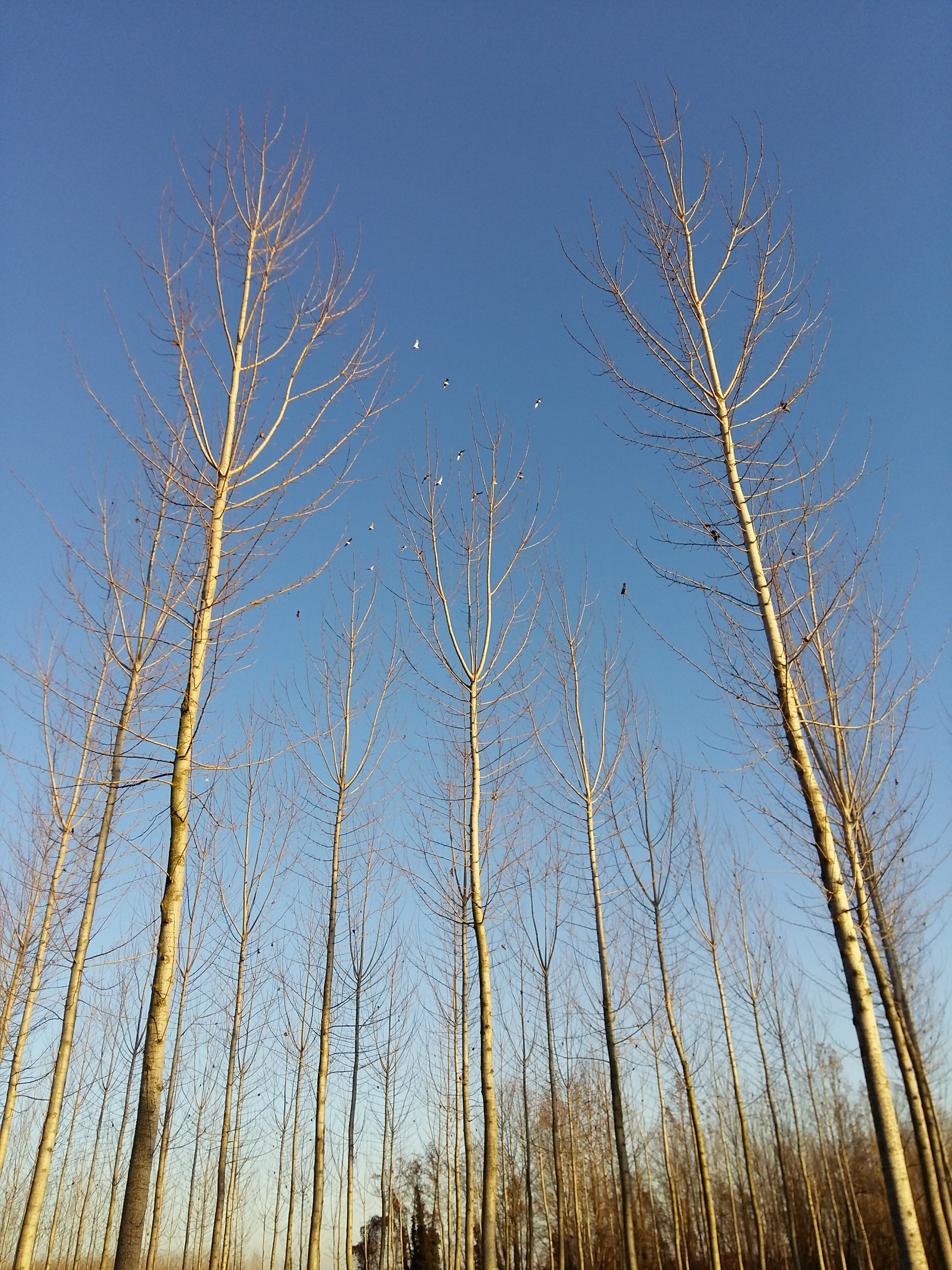 Pioppi nella campagna di Pocenia